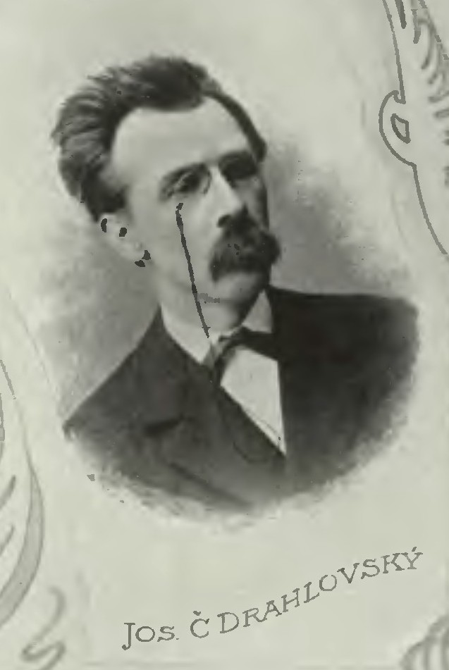 Portrét – Josef Čapek-Drahlovský (1847-1926), Český hudební skladatel.